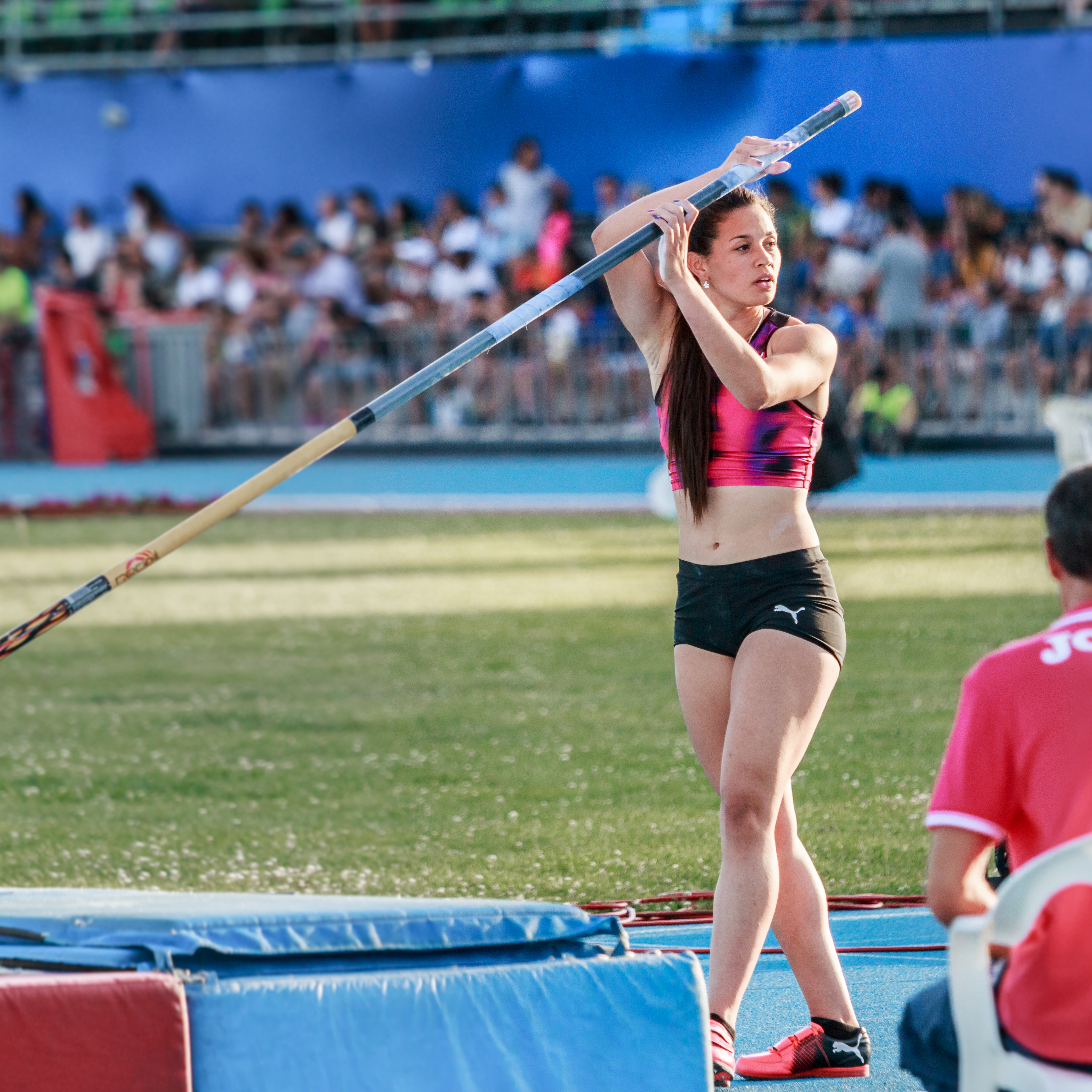 Robeilys Peinado (VEN). Salto con garrocha. IAAF World Challenge. Meeting Madrid 2017. Moratalaz, Madrid.